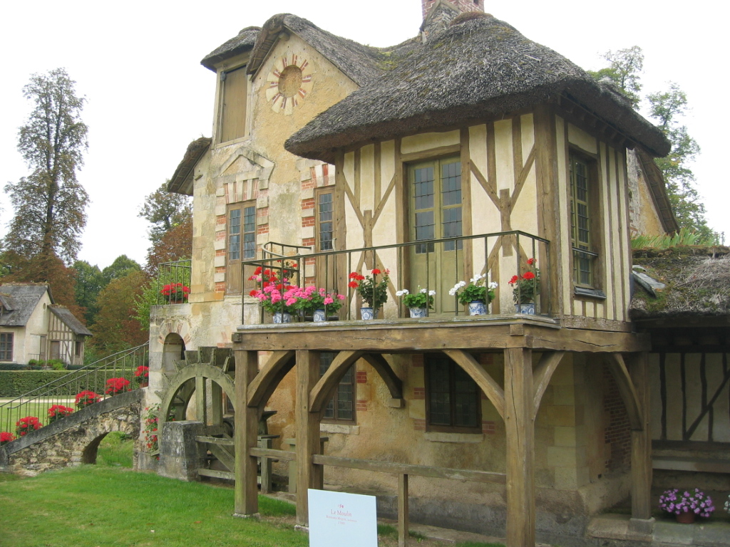 Moulin du Hameau de la Reine - Versailles